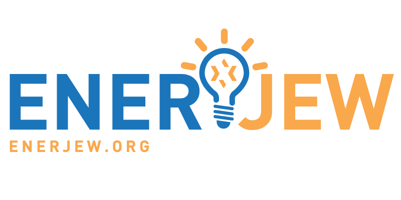 Логотип проекта